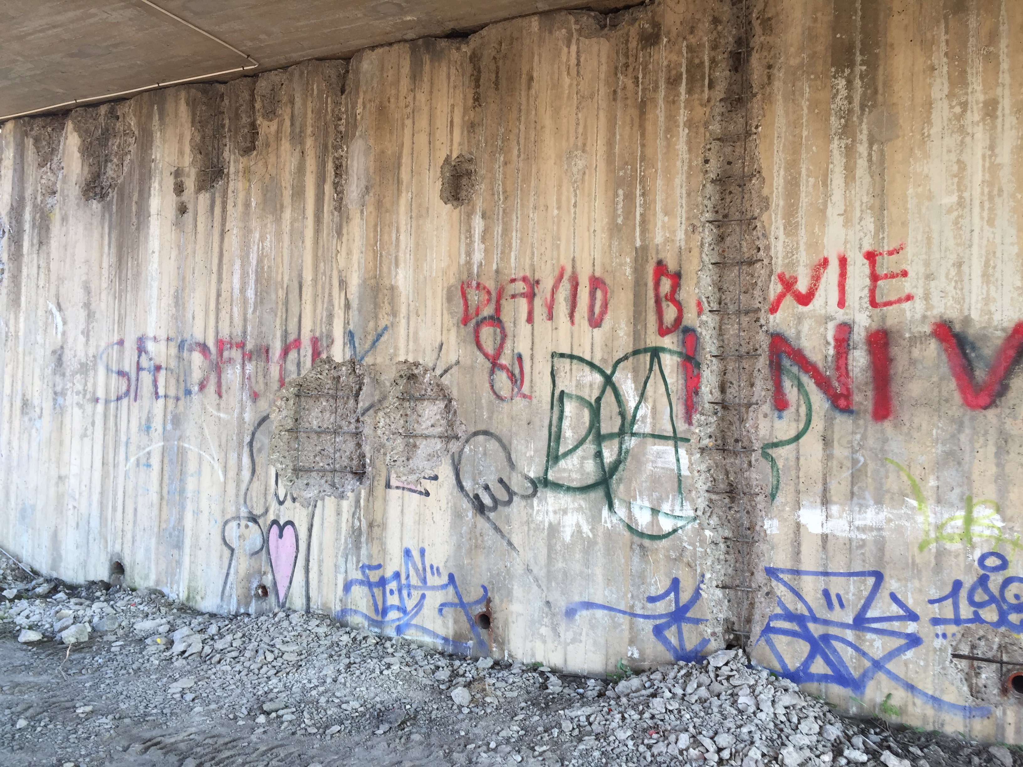 Sædfuck-taggen på Bøler i Oslo. Bilde tatt i oktober 2015, mens Bøler t-banestasjon ble renovert.